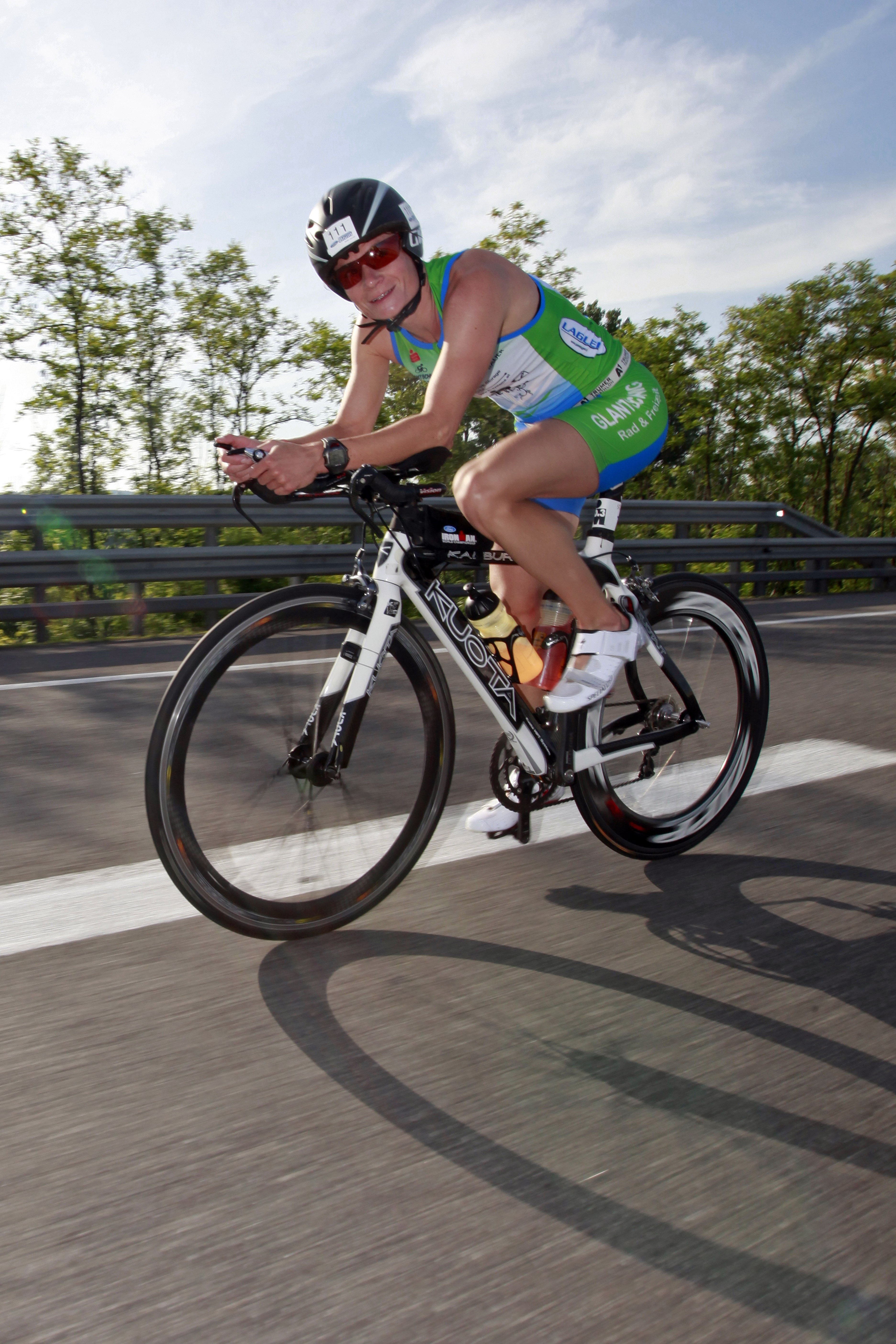 Simone Fürnkranz at Ironman 70.3 Austria 2012